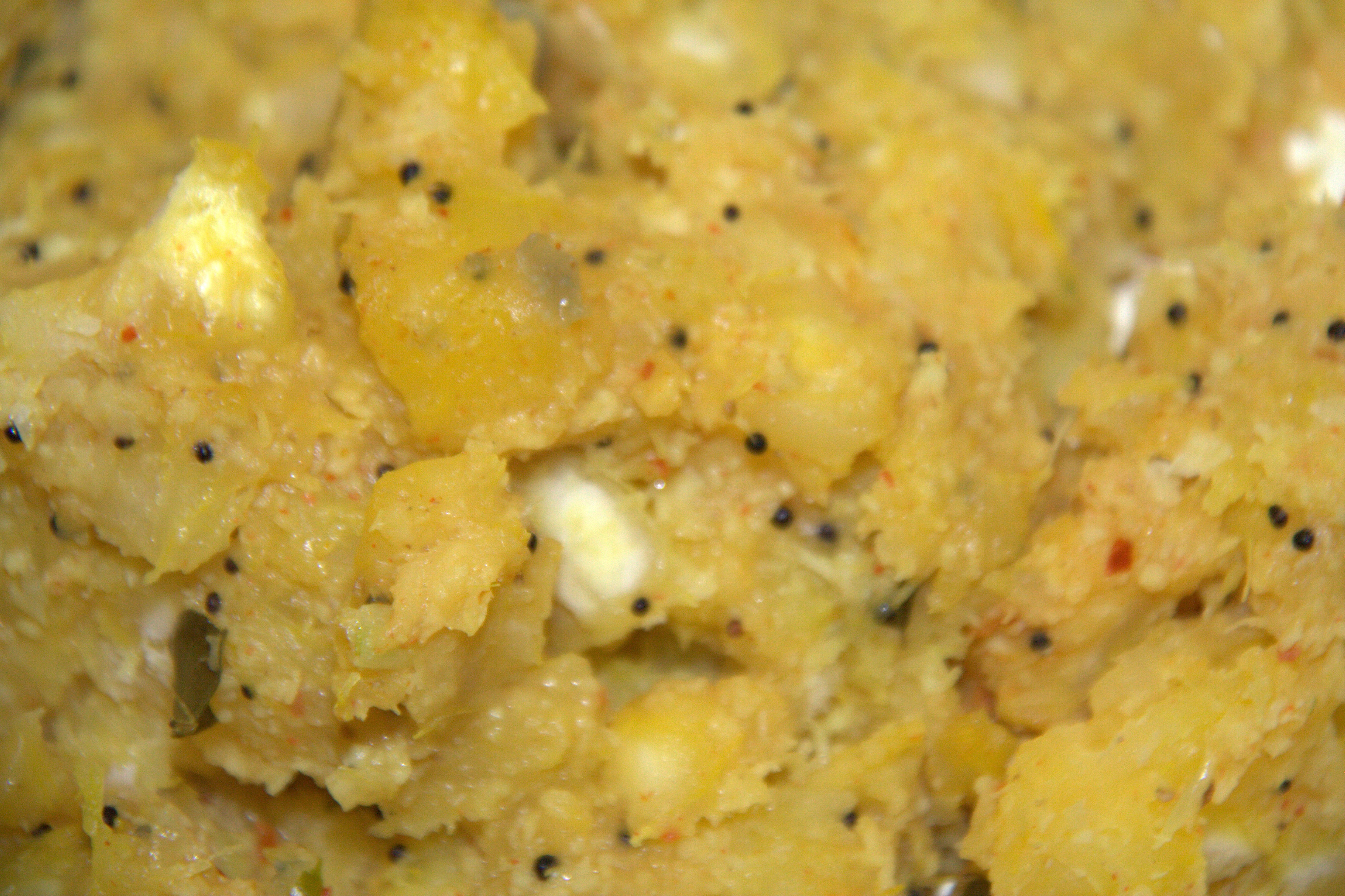 കിഴങ്ങ് പുഴുങ്ങിയത്